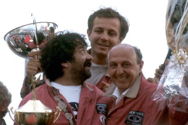 Stefano Casiraghi (Mitte) mit seinen Teammitgliedern Patrice Innocenti (links) und Romeo Ferraris